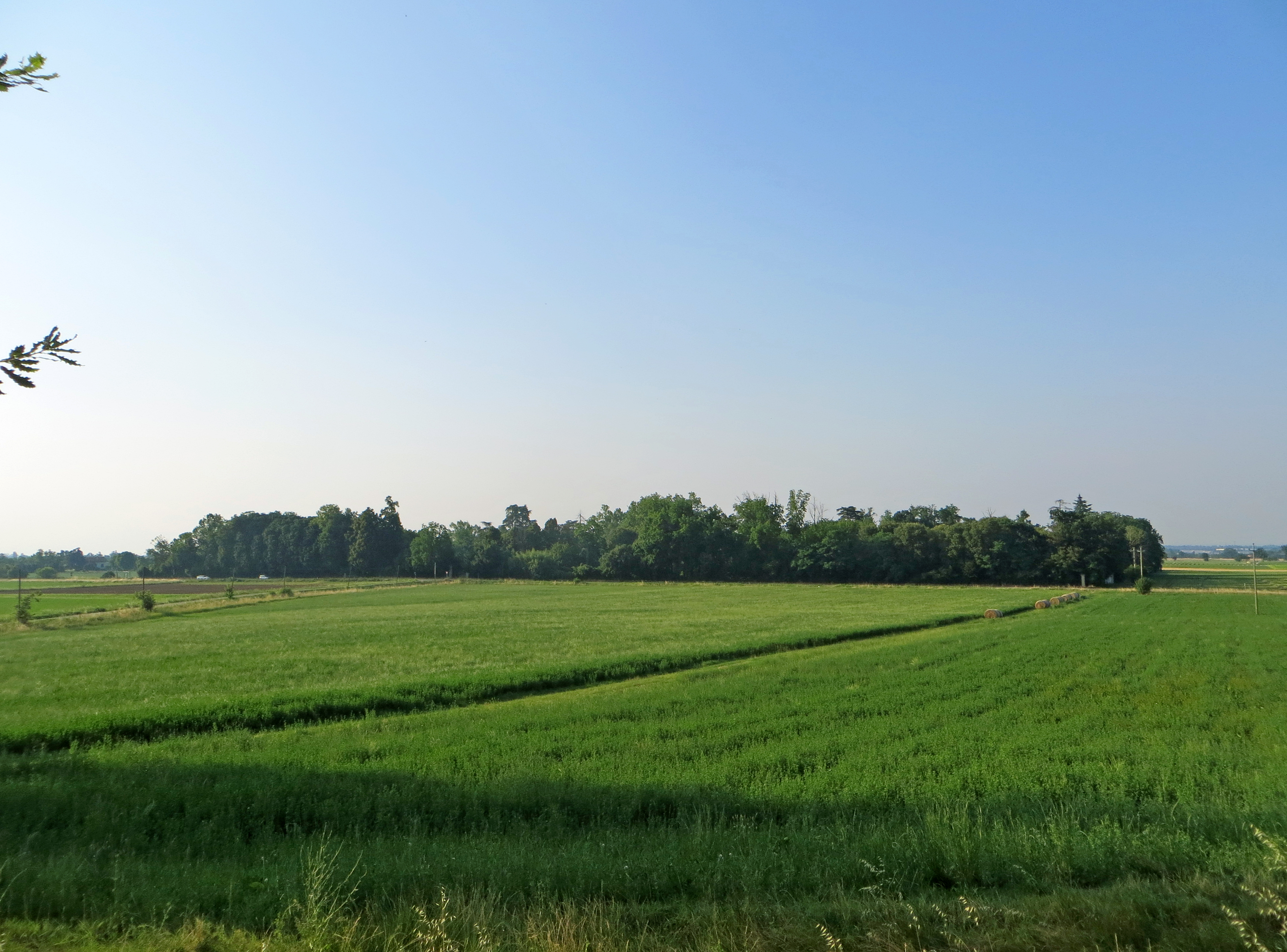 Villa Magnani (Mamiano, Traversetolo) - parco visto dal castelletto neogotico